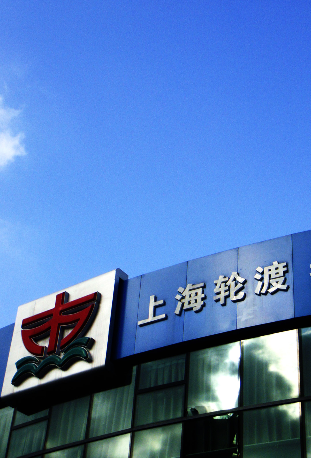 2011年复兴东路轮渡站的上海轮渡标志